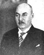 Ādolfs Bļodnieks, Prime Minister of Latvia 1933–1934.